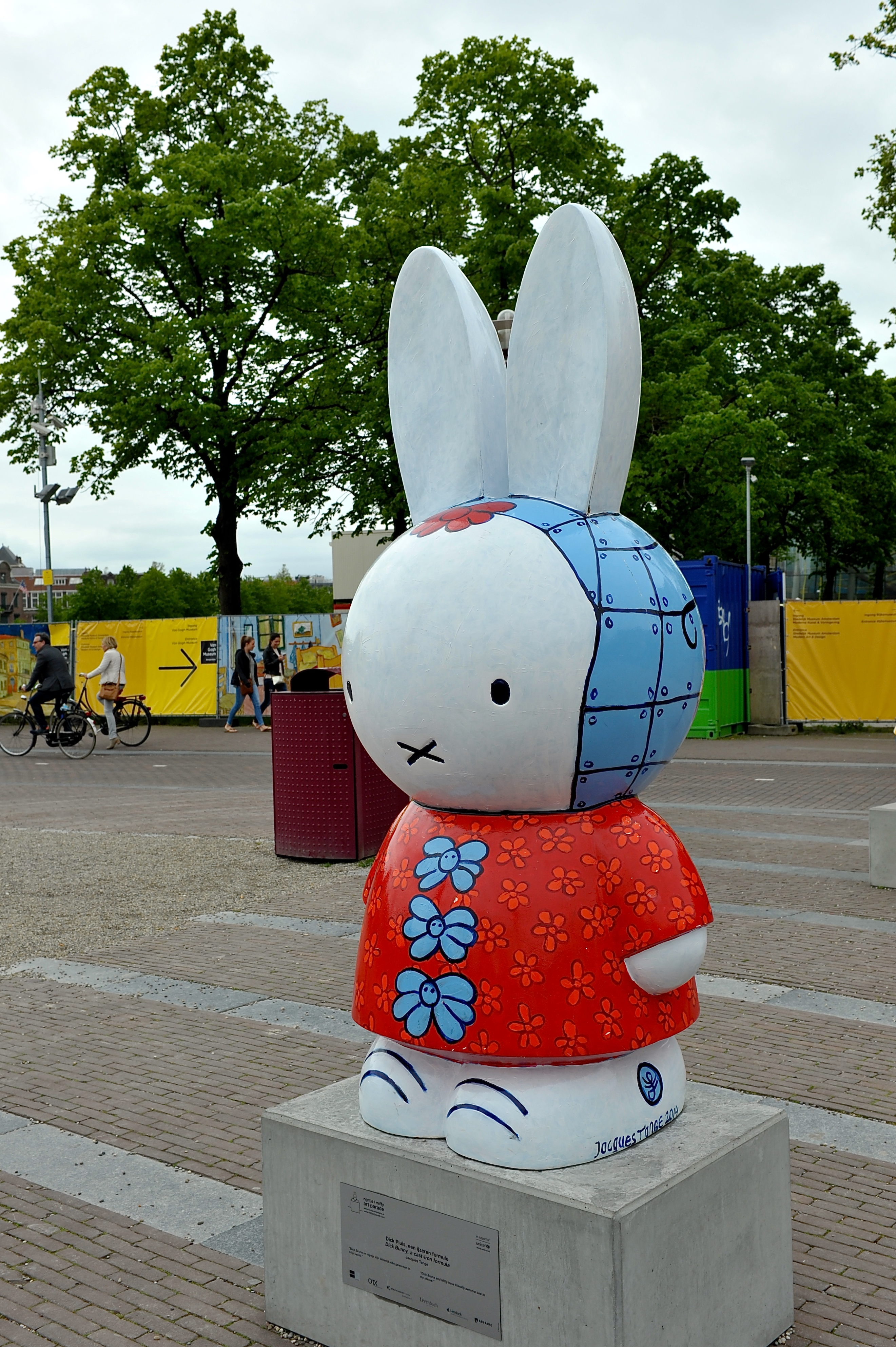 'Dick Pluis, een ijzeren formule - Dick Bunny, a cast-iron formula" van de Nederlandse kunstenaar Jacques Tange (Vlissingen 1960). Nijntje, bedacht door de Nederlandse kunstenaar Dick Bruna, viert dit jaar haar 60ste verjaardag. De Nijntje art parade, die op meerdere plekken in Nederland wordt gehouden, is een ode aan Nijntje en haar bedenker.